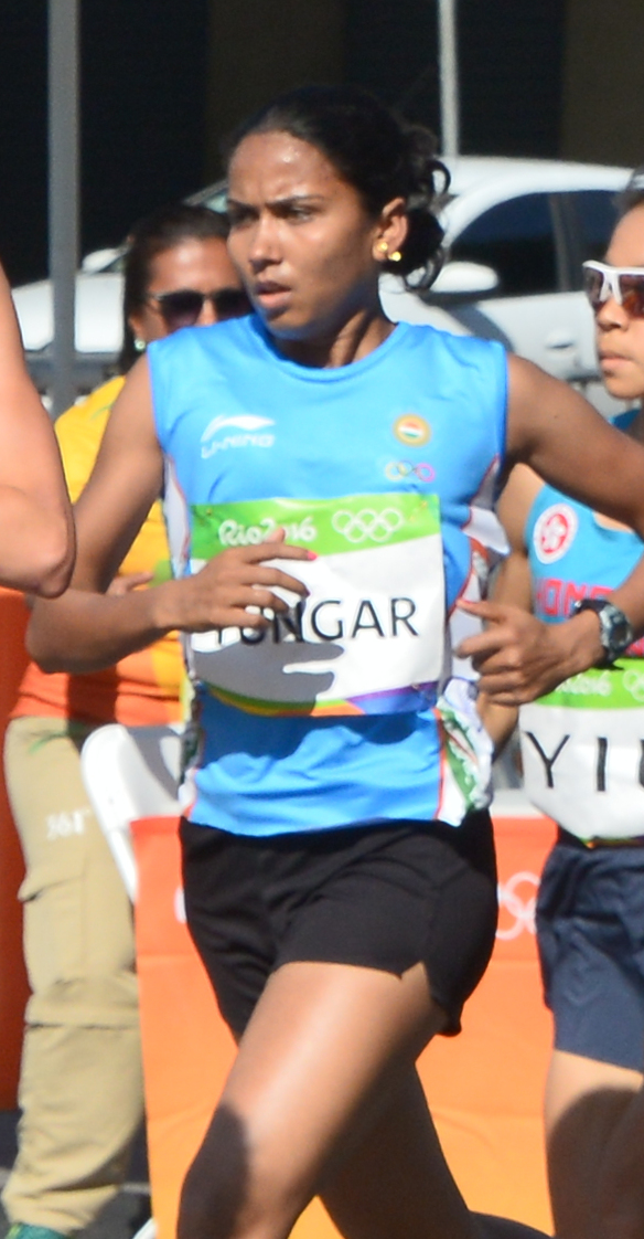 Passage du marathon des jeux olympiques de Rio 2016 dans le centre de Rio